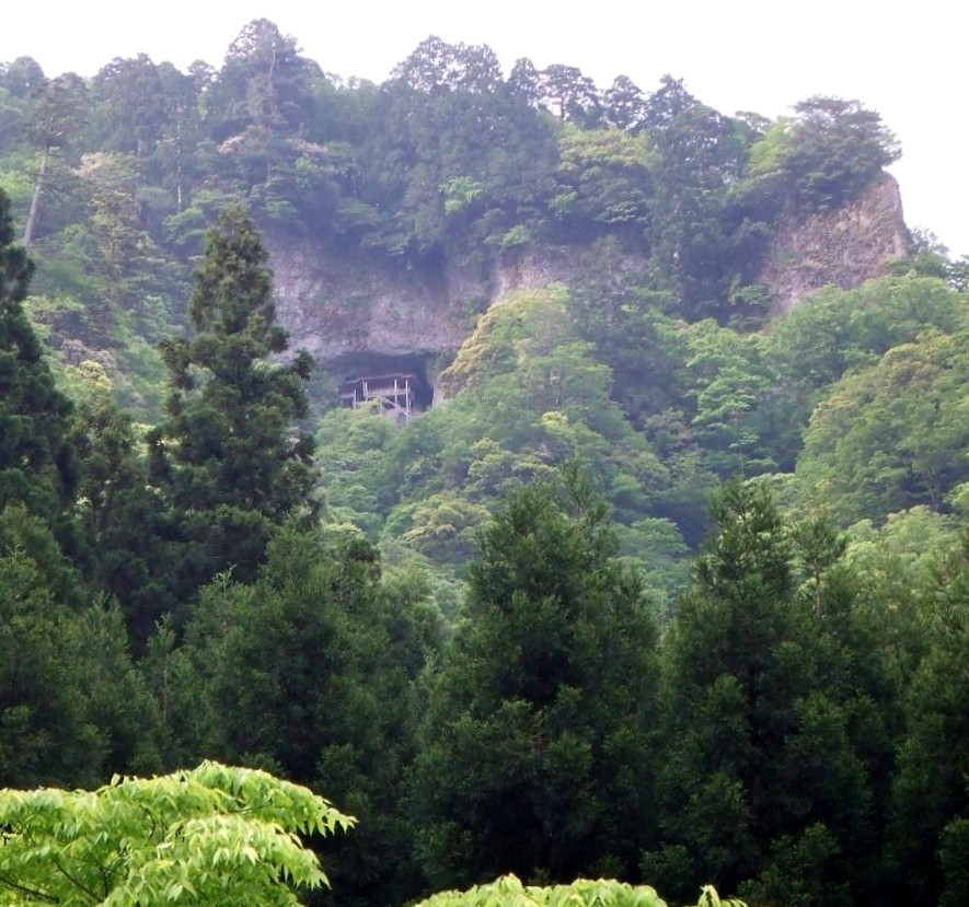 三徳山の投入堂 遥拝所より